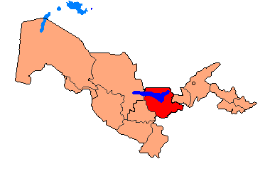 Uzbekistan - Jizzax Province